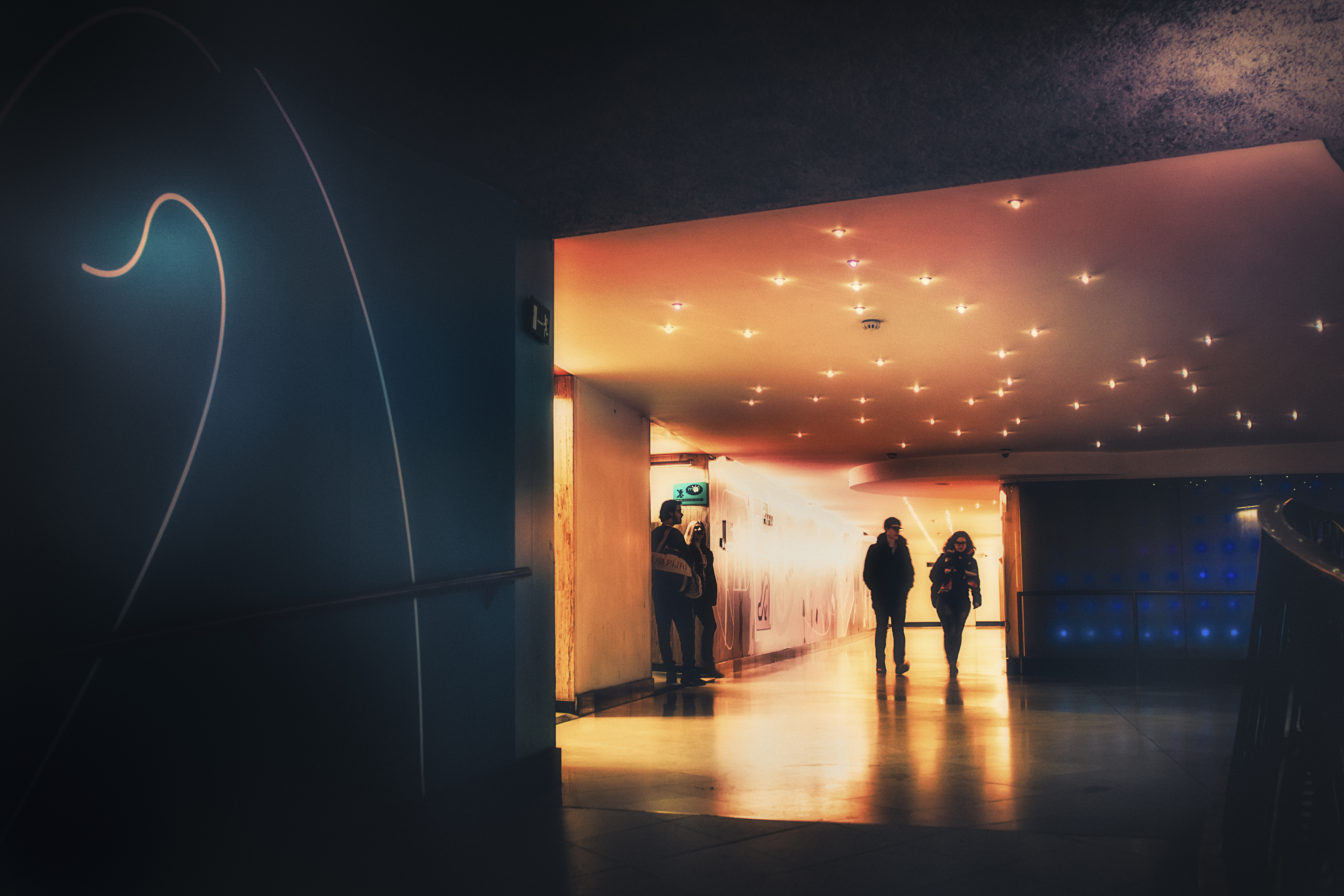 Brussel, Hortagalerij